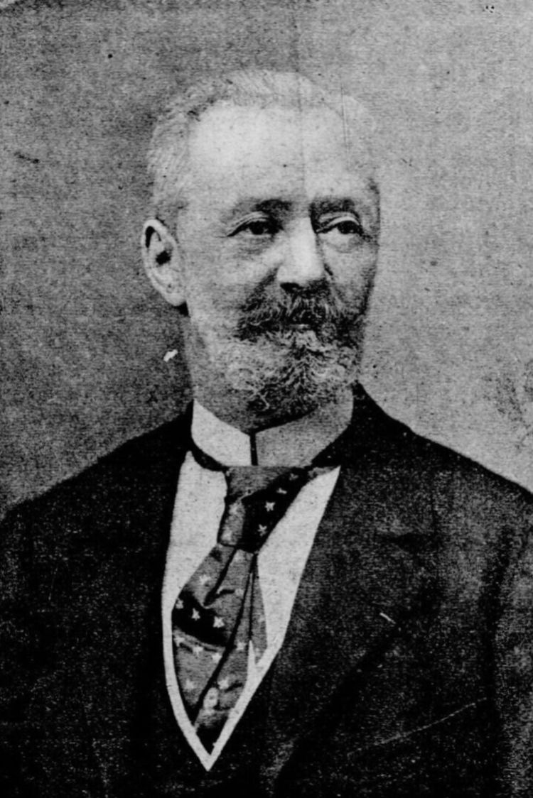 photographie du facteur de pianos Edouard Mangeot parue dans l'Annuaire des artistes et de l'enseignement dramatique et musical 1894